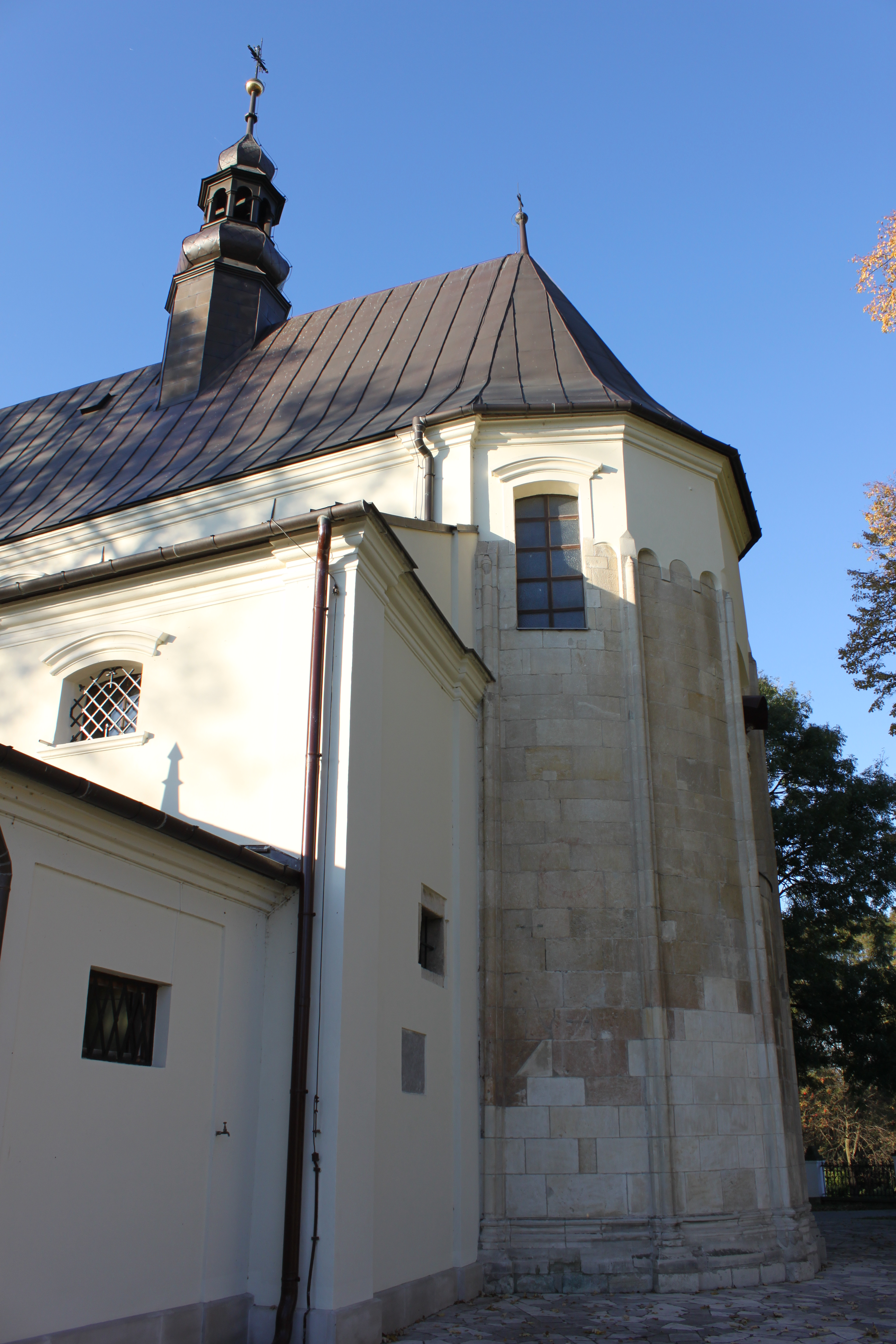 XV edycja Małpolskich Dni Dziedzictwa Kulturowego. Kościół pw. św. Wojciech w Kościelcu 18-19 maja. fot. J. Nowostawska-Gyalókay, MIK 2012